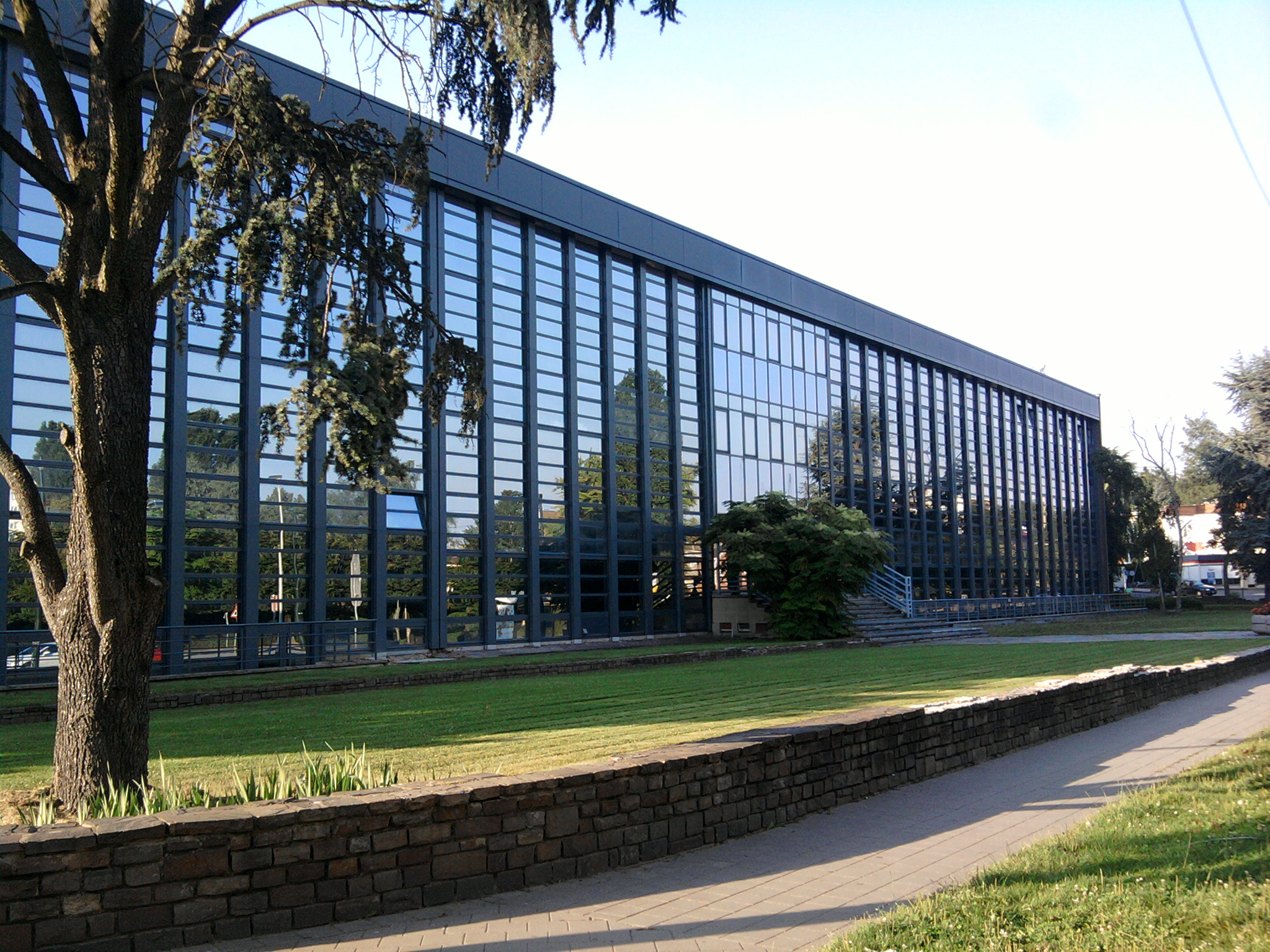 Institut Redouté-Peiffer